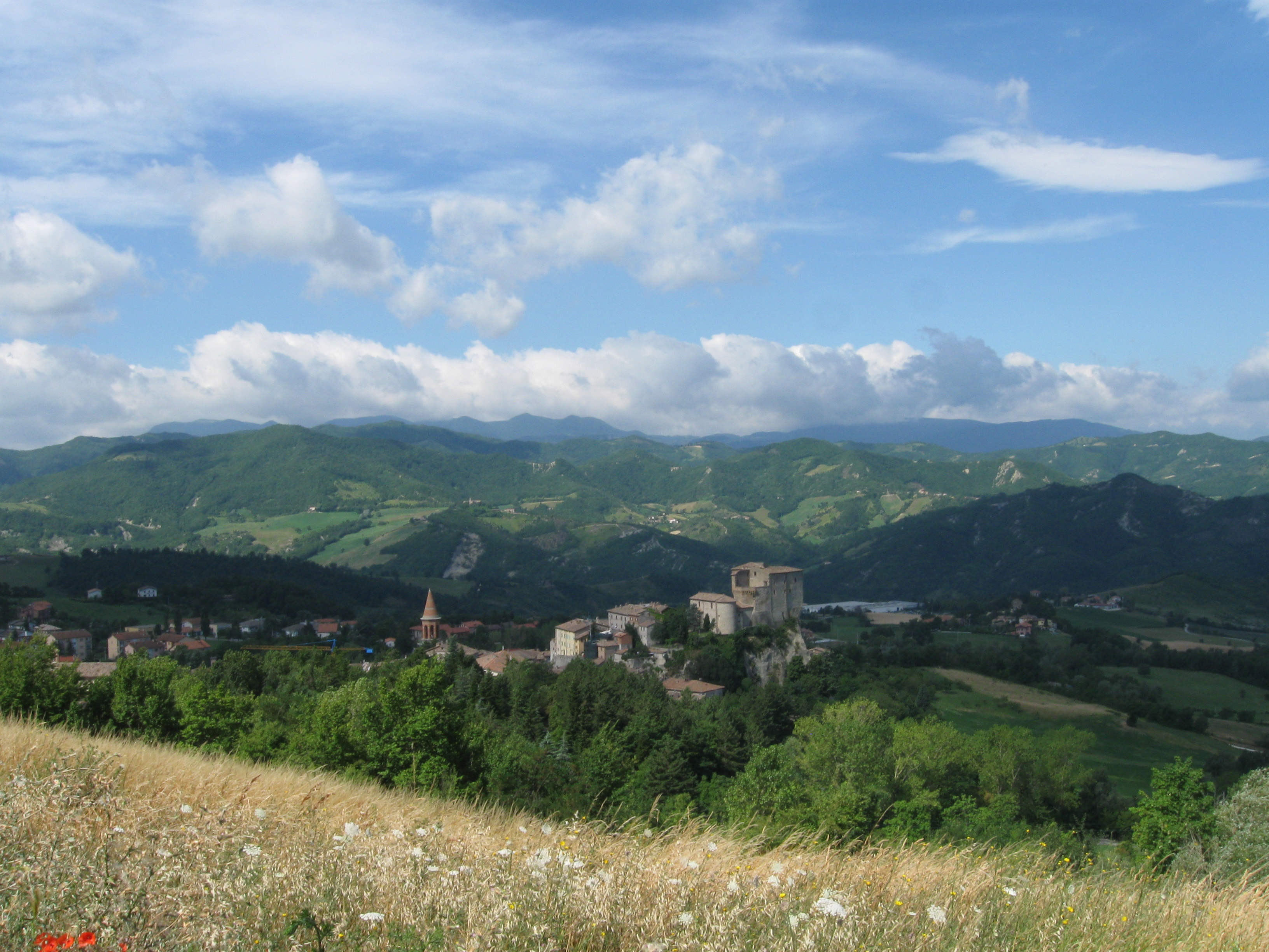 Sant'Agata Feltria (RN) dall'alto